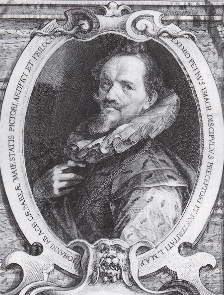 Portrait of Hans von Aachen